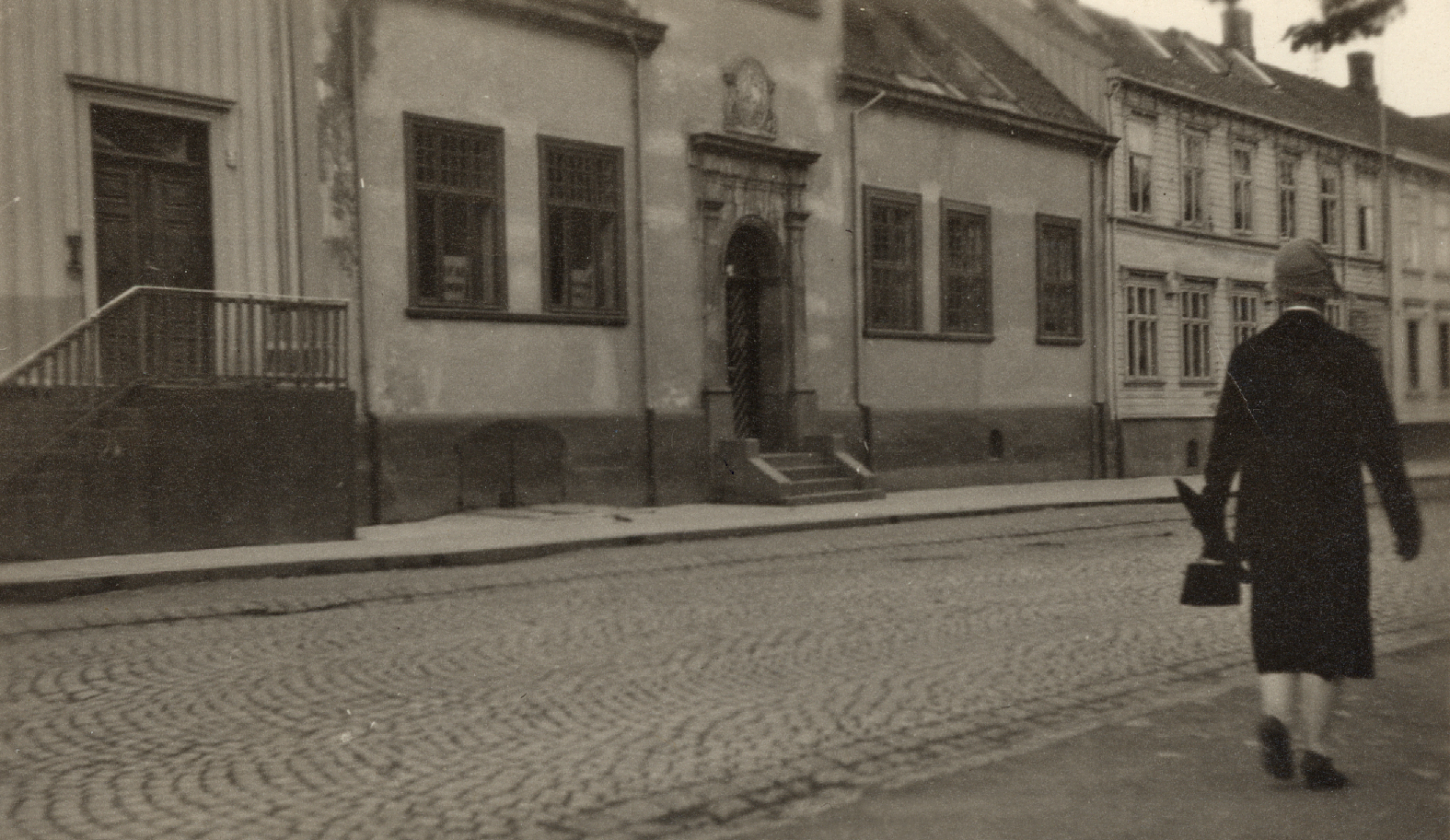 Format: Fotopositiv Dato / Date: Ukjent Fotograf / Photographer: Mulig Sverre Pedersen (1882 - 1971) Sted / Place: Kjøpmannsgata 34, Trondheim Lenke / Link: Gramgården (Sverresborg Trøndelag Folkemuseum) Eier / Owner Institution: Trondheim byarkiv, The Municipal Archives of Trondheim Arkivreferanse / Archive reference: Tor.H45.F11000 Merknad: Gramgården helt til venstre i bildet ble fredet i 1927, men allerede i 1951 ble den revet for å gi plass til en moderne forretningsgård. Gramgården ble i 1996 rekonstruert på Trøndelag folkemuseum. (Trondheim byleksikon, 2008).